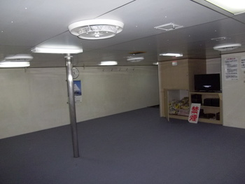 貨物フェリー客室